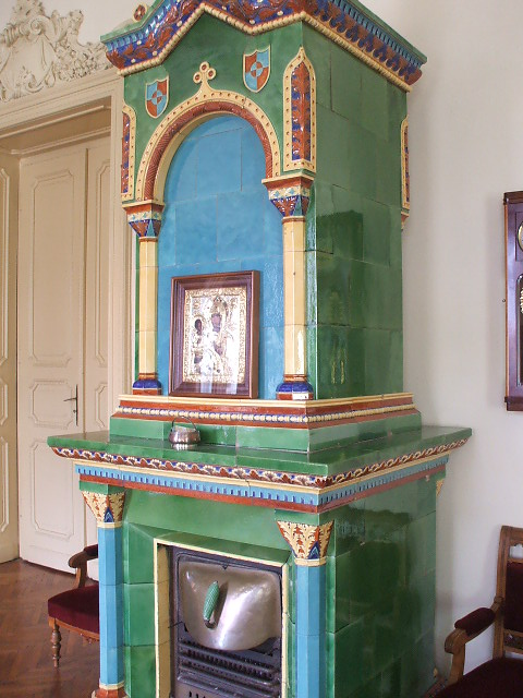 Poële en faïence de style Secession, installé en 1911.